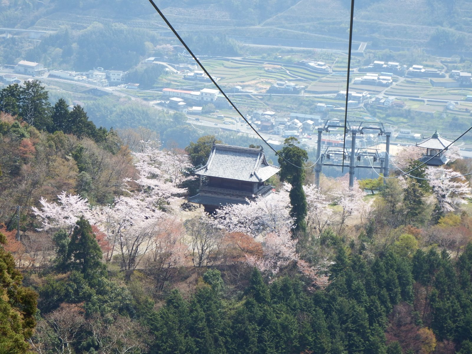 箸蔵寺の仁王門と高灯籠